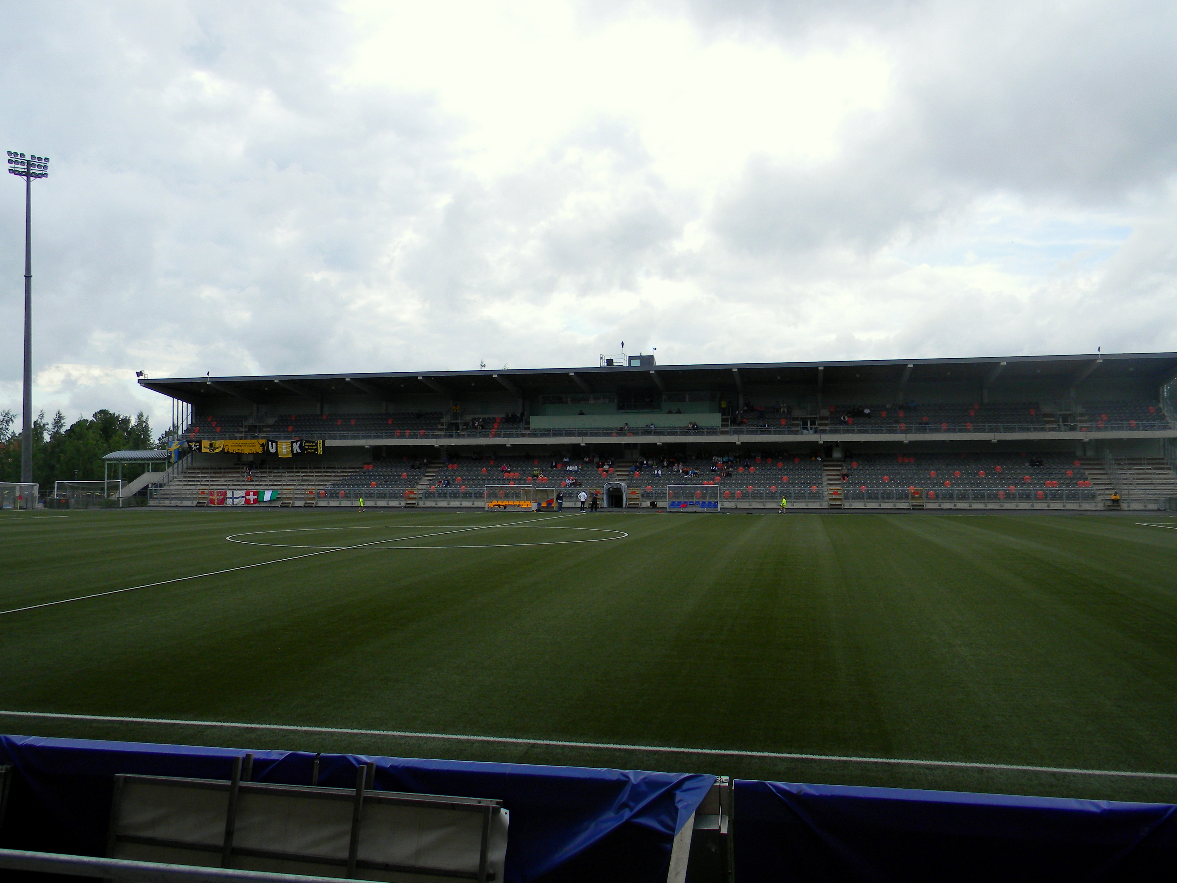 Gammliavalen, a football stadium in Umeå, Sweden